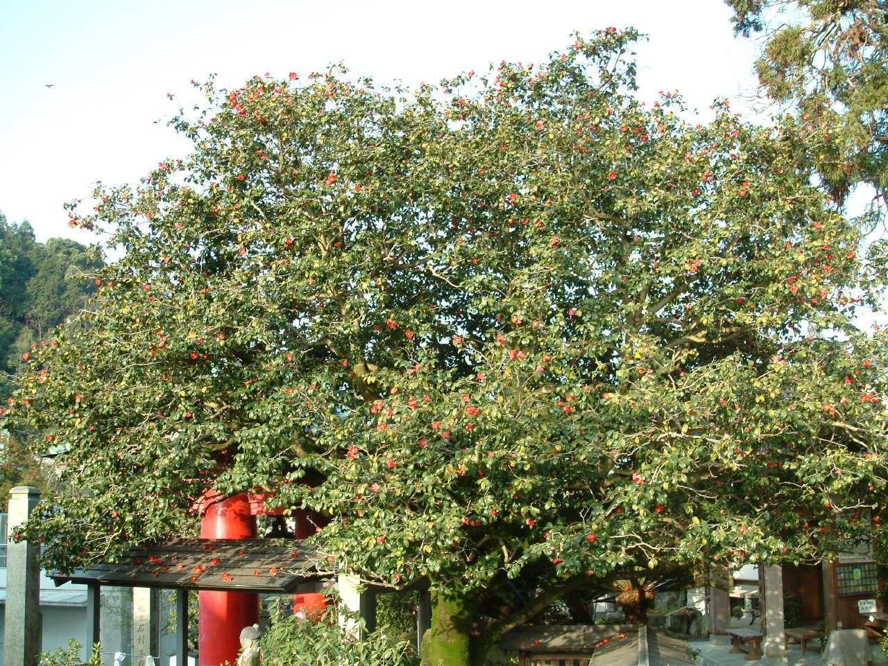 通称となっている椿堂のシンボルの大椿